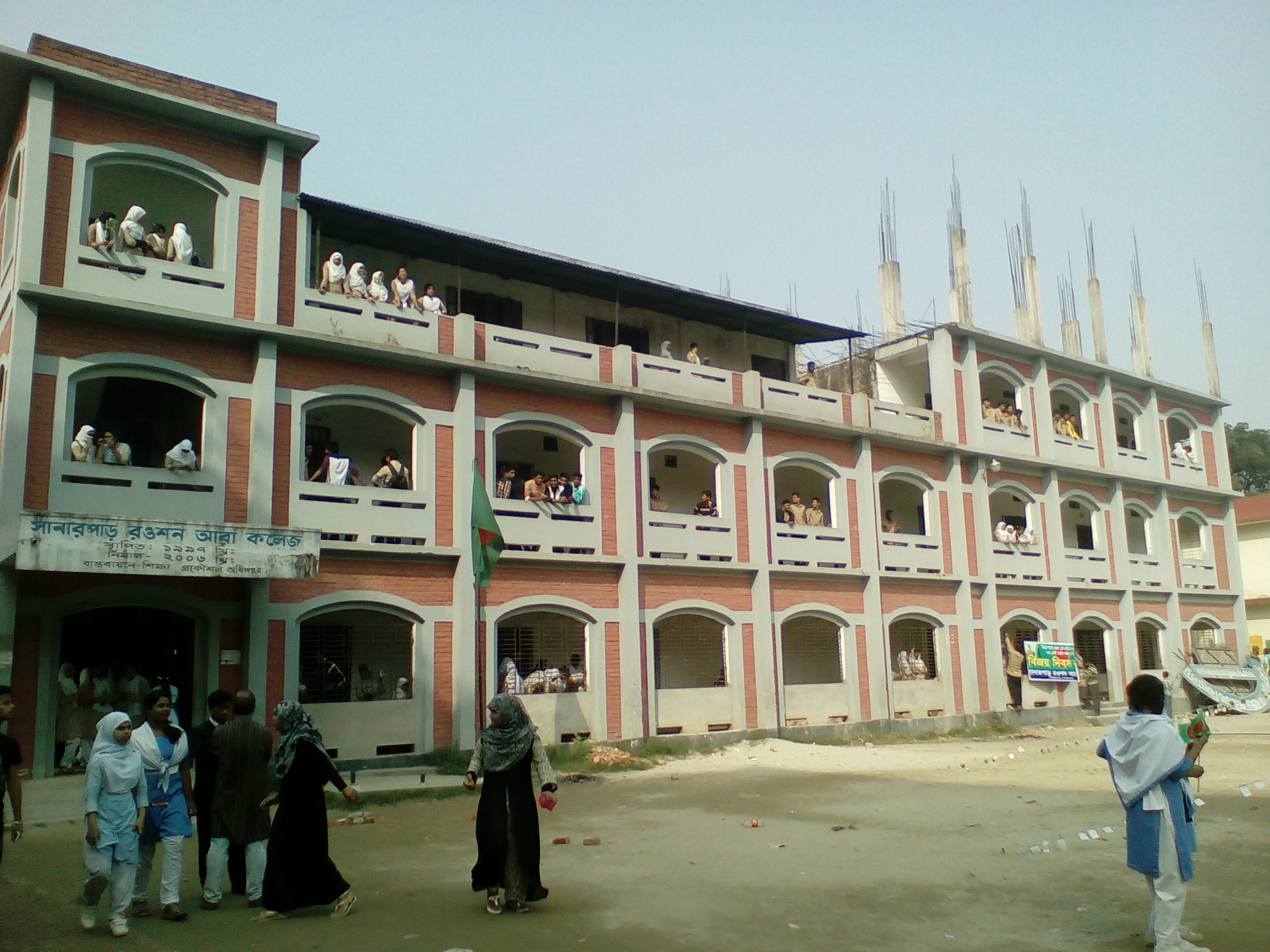 কলেজের একাডেমিক ভবন